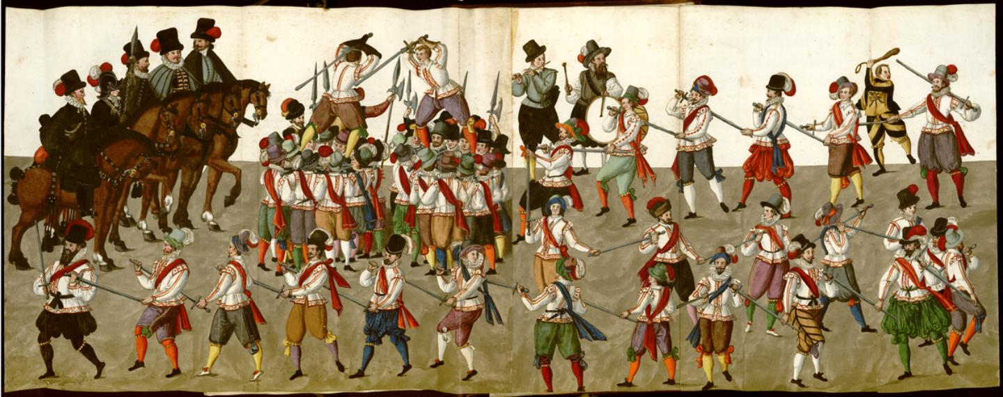 Schoenbartbuch (Nurnberg Carnival Book) Nurnberg